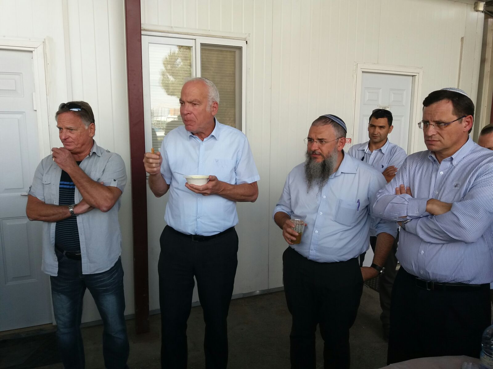 שלמה נאמן1